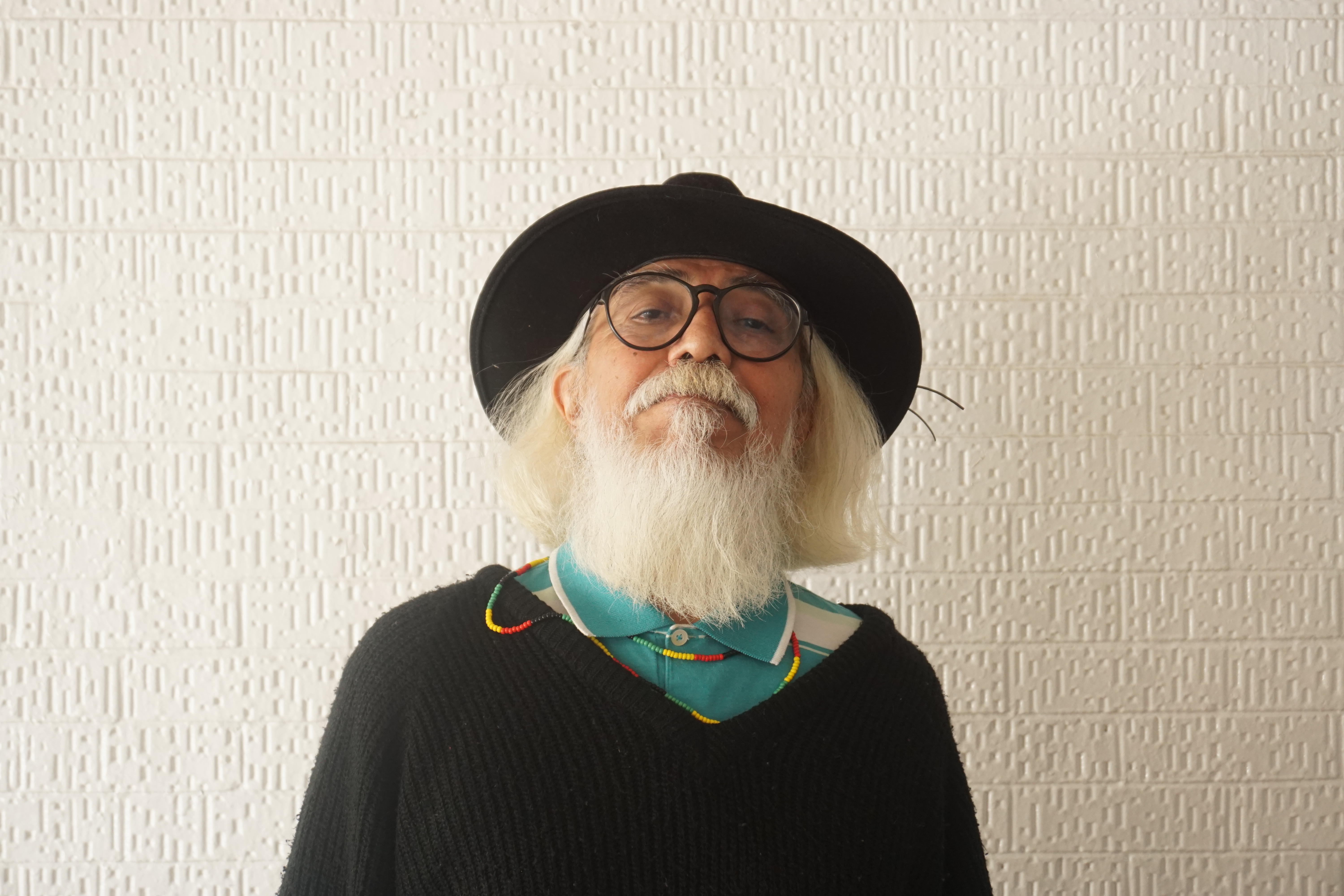 El poeta, periodista y catedrático Salvador Mendiola en la Facultad de Estudios Superiories Aragón el 14 de noviembre de 2019.